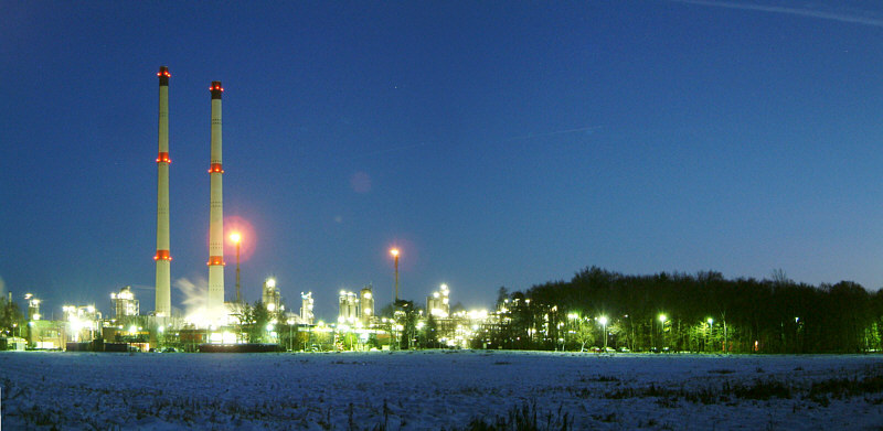 Großenkneten, Blick auf die Exxon Mobile Production